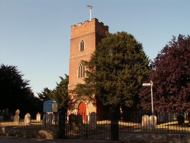 St. Andrew's church, Layham, Suffolk